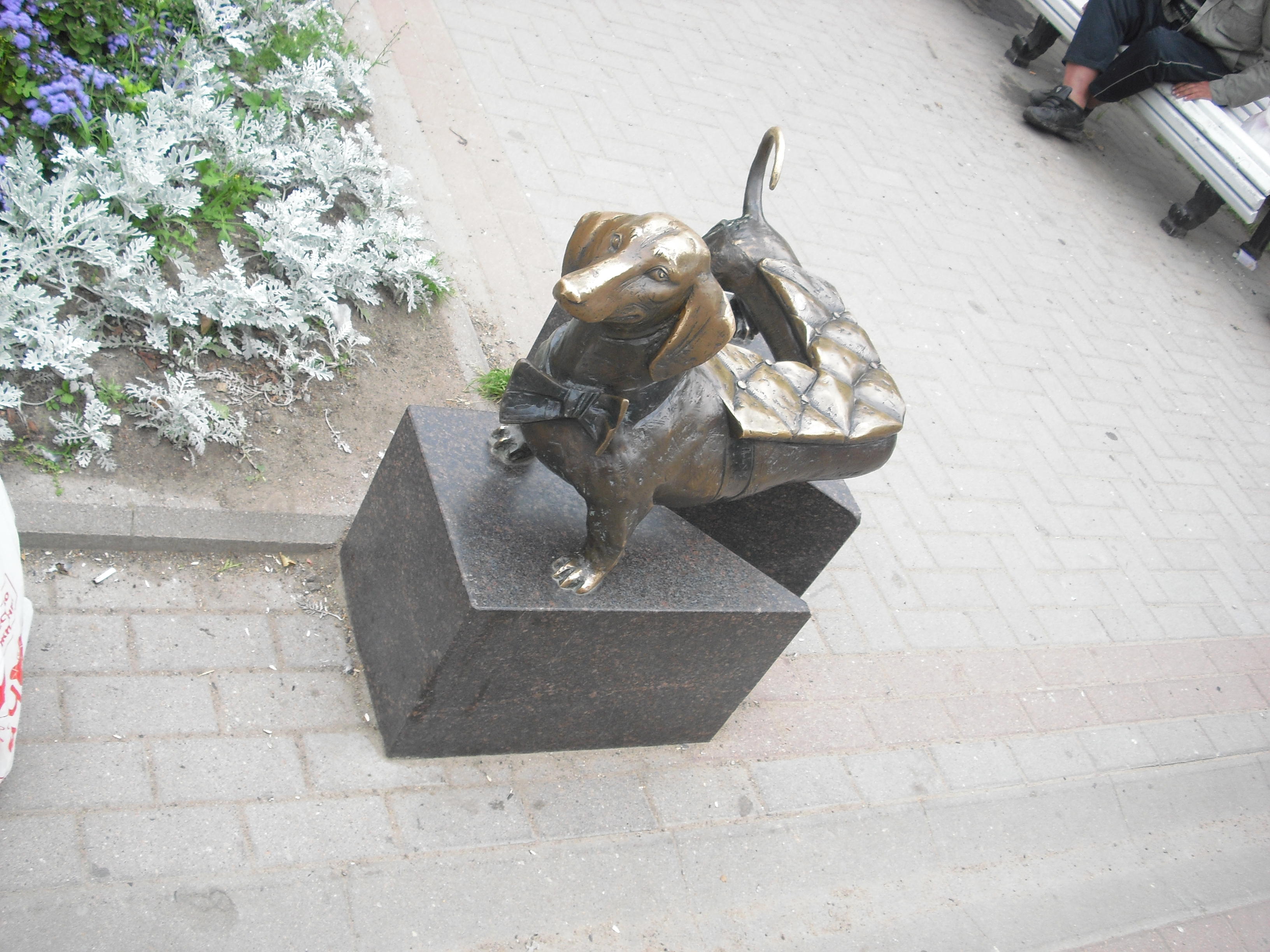 Mäyräkoirapatsas Terijoessa, Venäjällä